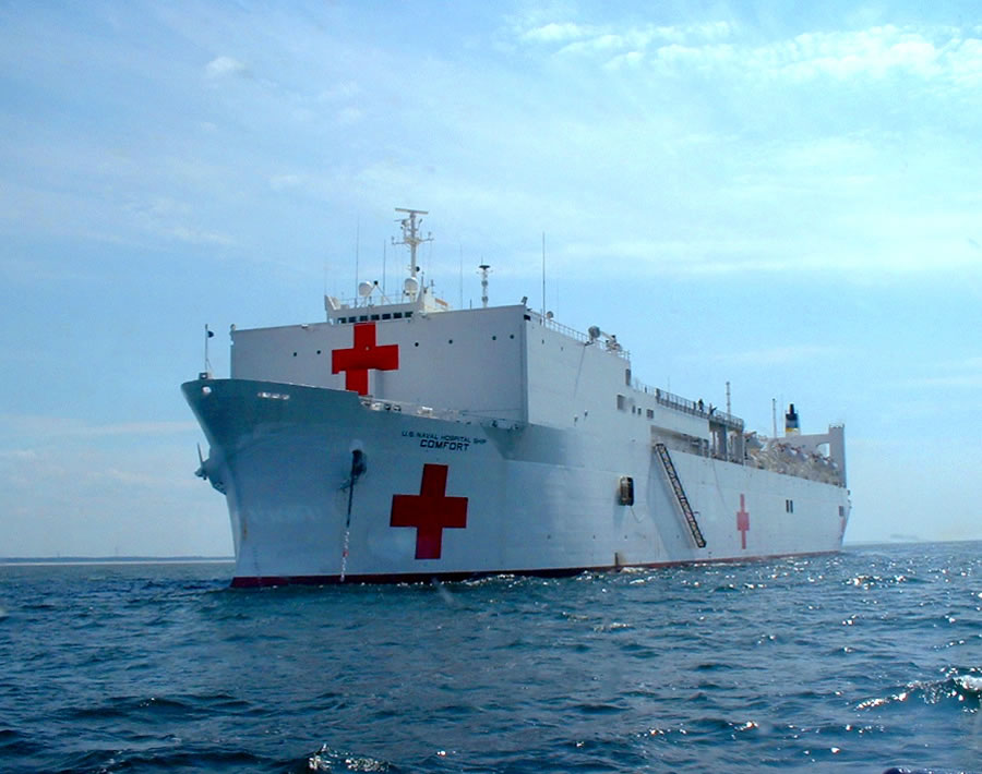 USNS Comfort (T-AH 20) vor Anker in der Ostsee bei Litauen